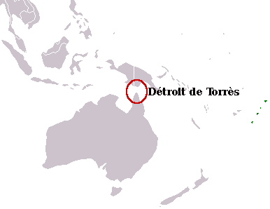 Détroit de Torres